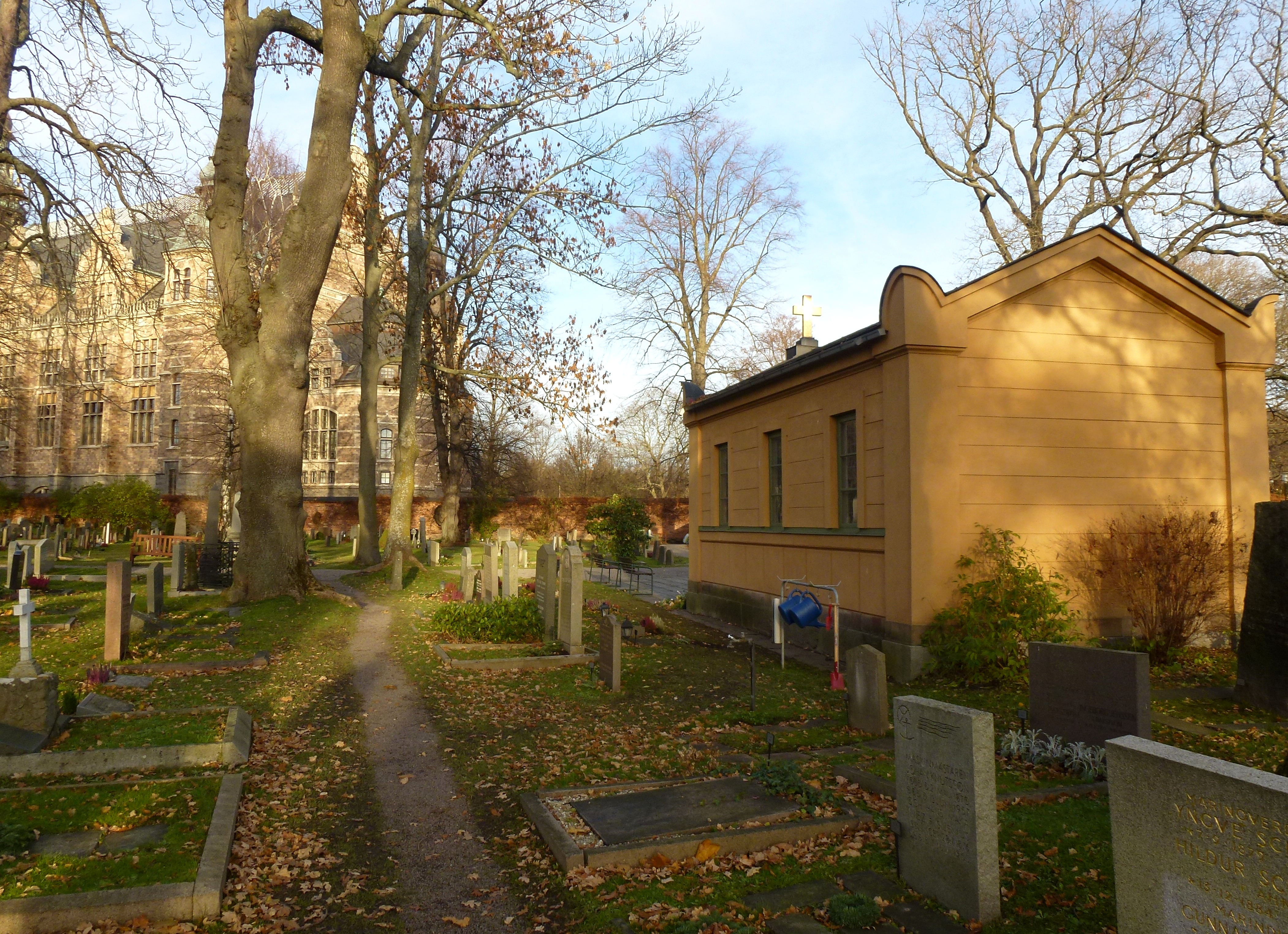 Galärvarvskrykogården och kapellet